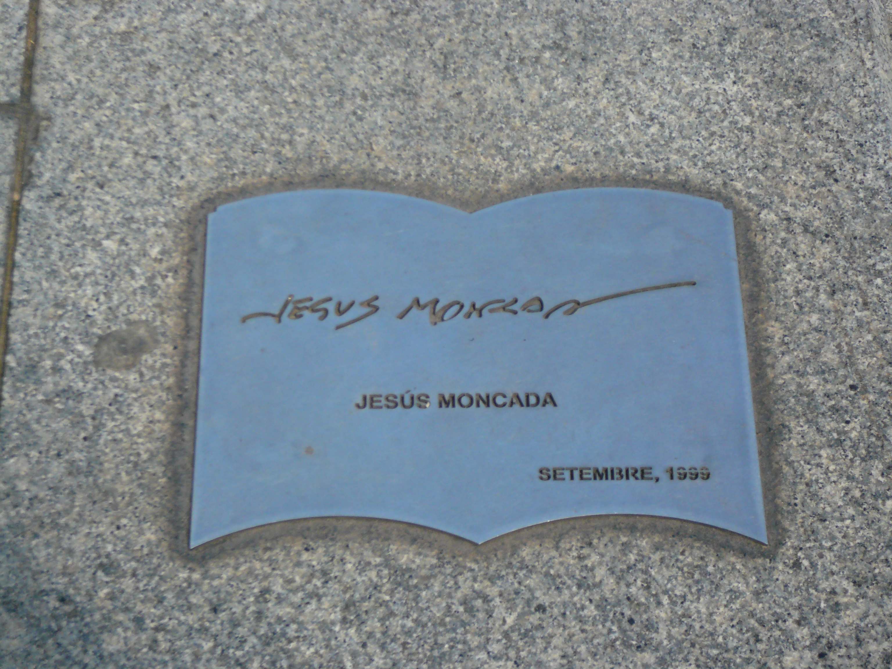 Monument al Llibre, Saltamartí. Gran Via de les Corts Catalanes amb pg. de Gràcia (Barcelona). Escultor: Joan Brossa, signada, amb la col·laboració de Josep Pla-Narbona. Material: planxa pintada d'acer inoxidable -originalment d'acer- sobre base d'acer inoxidable i de granit gris. 1994. 34″ N, 2° 10′ 05.05″ E